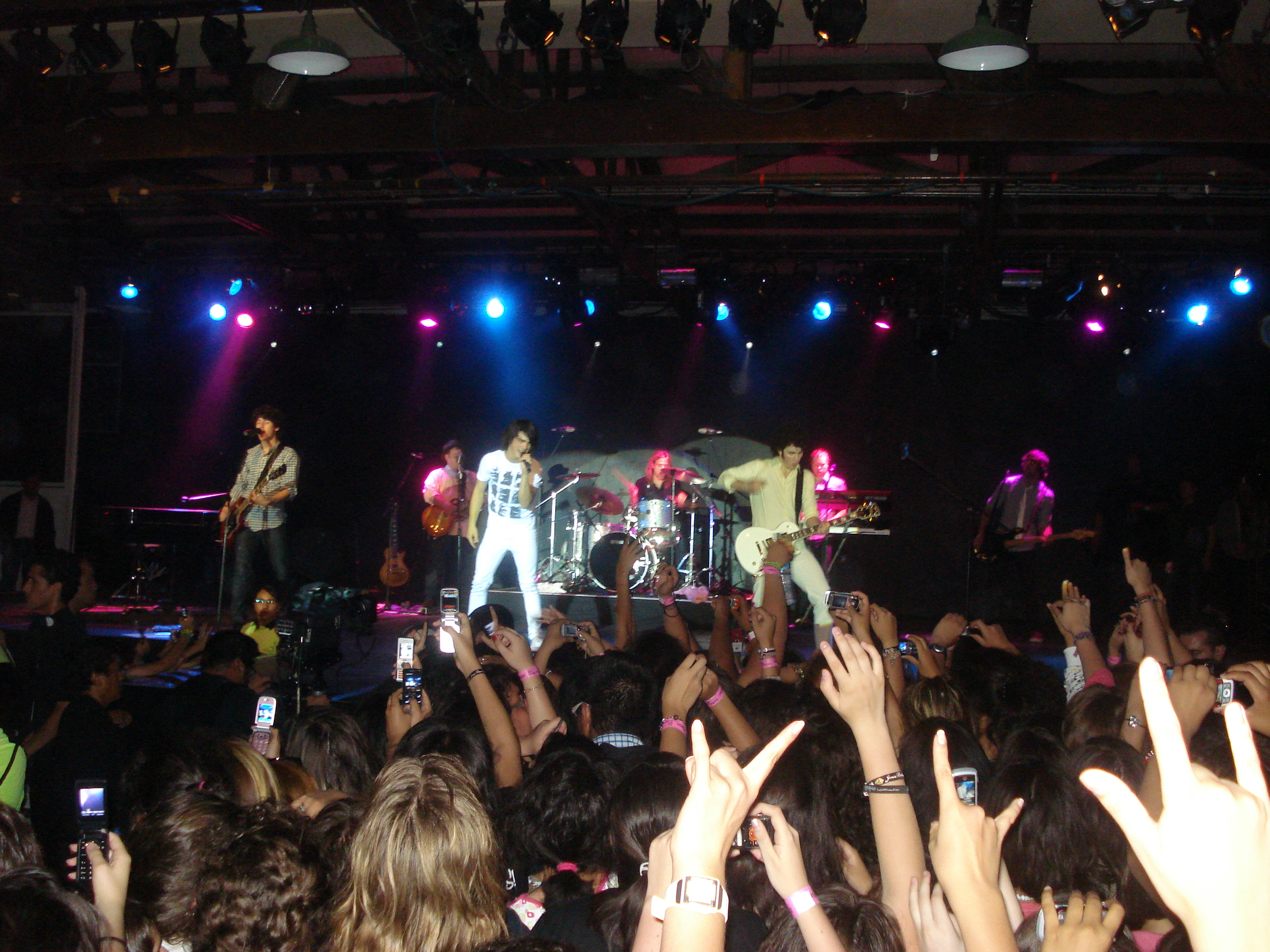 Un concert de Jonas Brothers à Mexico.